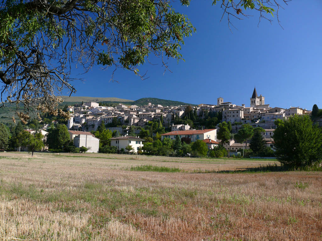 Spello, view